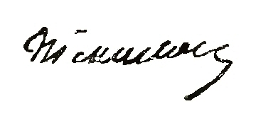 grafika z książki PL - Album biograficzne zasłużonych Polaków wieku XIX t.1 publikacja Marii Chełmońskiej Warszawa 1901